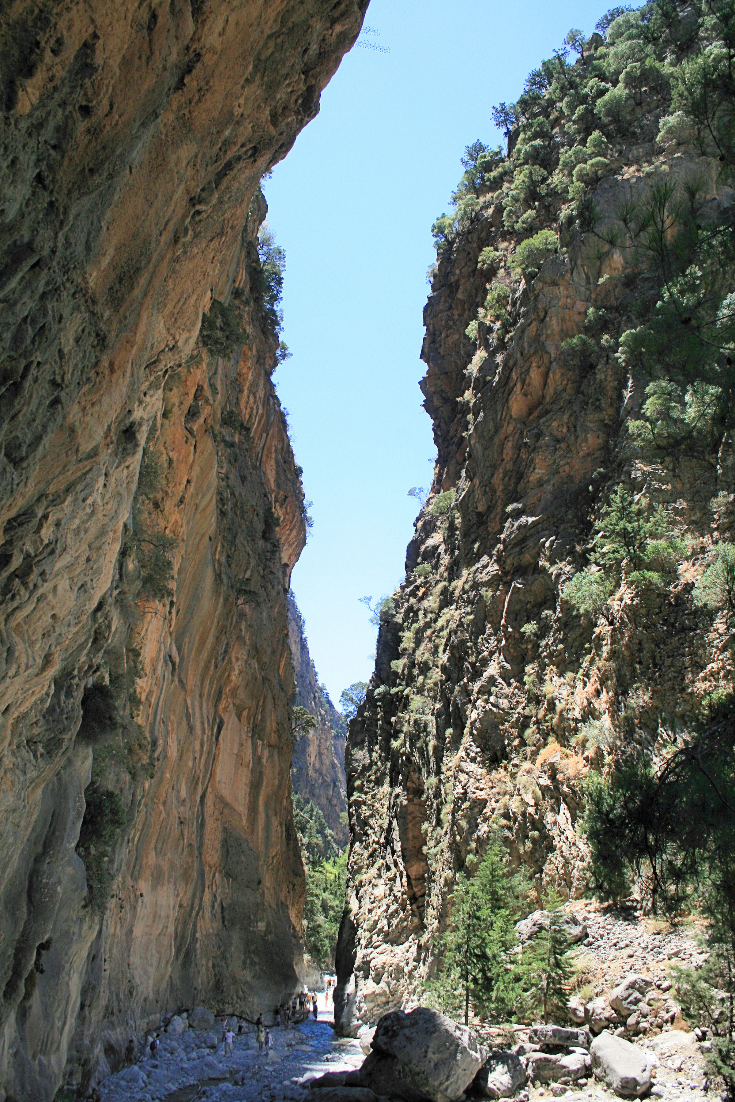 Das 3. Felsentor in der Samaria-Schlucht auf der Insel Kreta